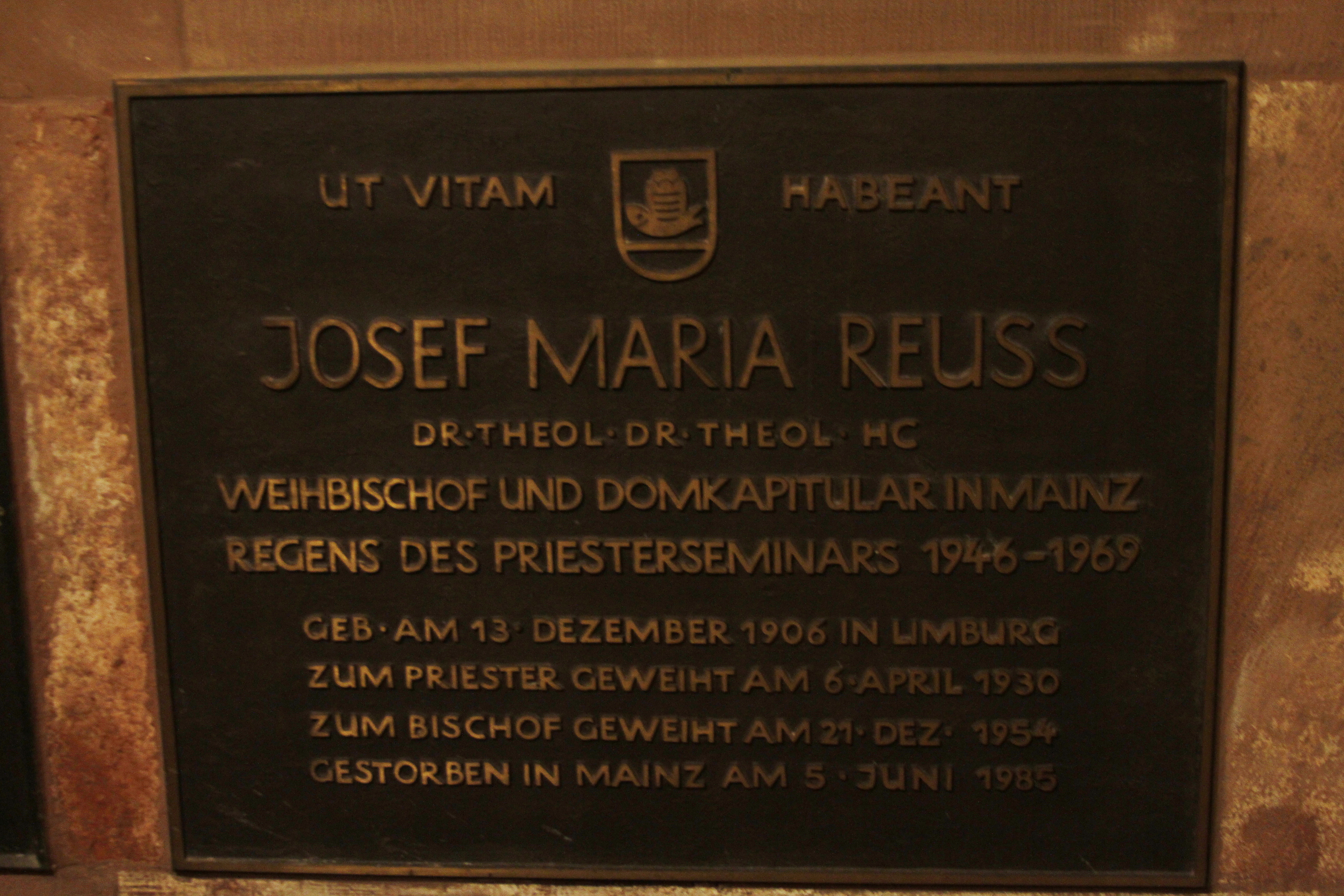 Mainz Cathedral - Mainz - Germany